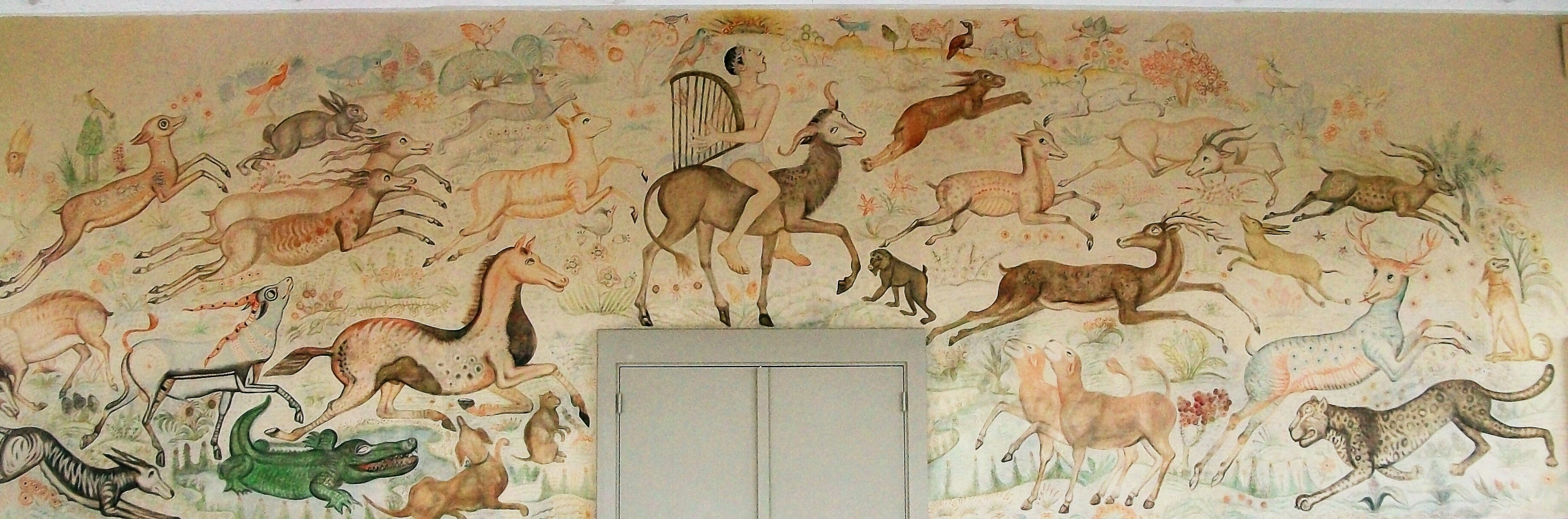 Anita Rée: Orpheus mit den Tieren, Wandbild in der Ballettschule Hamburg. Genehmigung zum Fotografieren in der Ballettschule liegt vor.This is a photograph of an architectural monument.